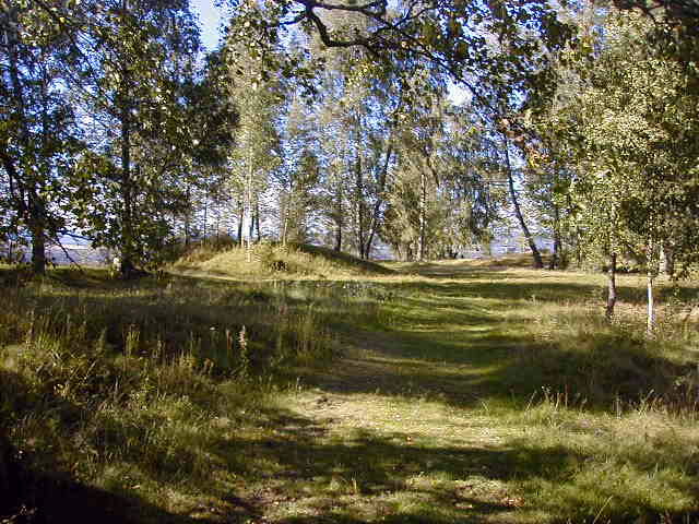 Gravhaug ved Stavhella på Norderhov i Ringerike